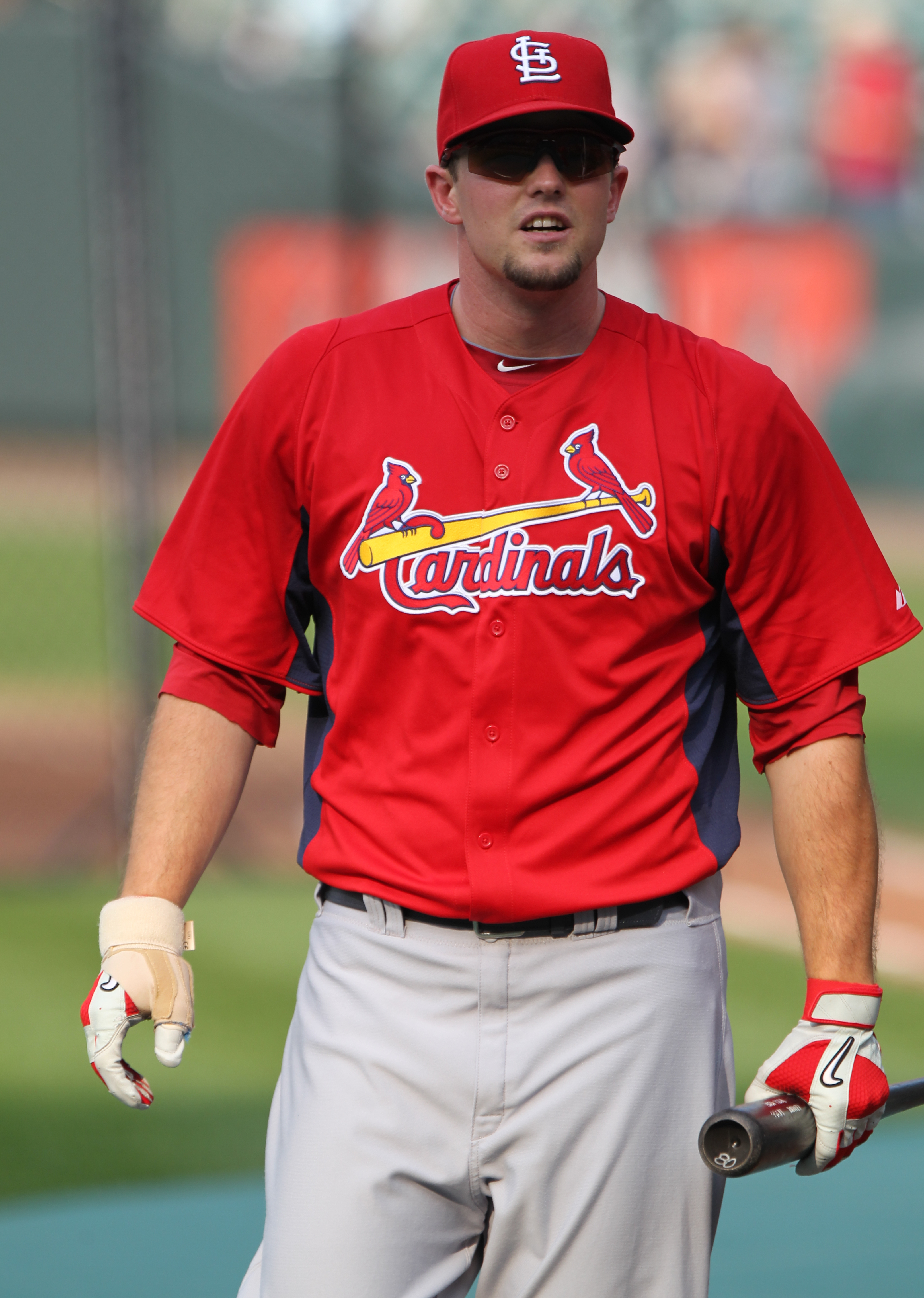 Cardinals at Orioles June 28, 2011.